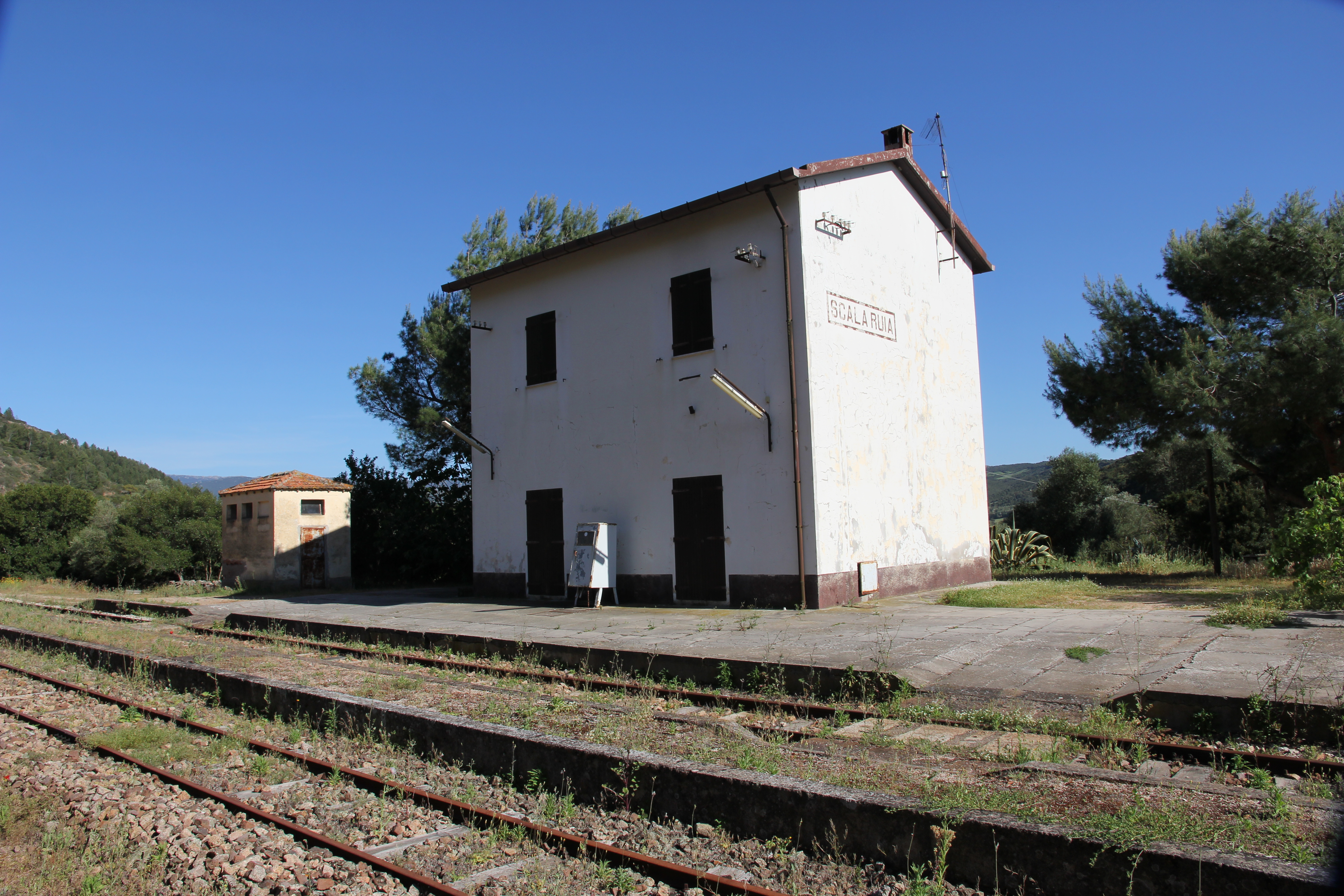 Bortigiadas, stazione ferroviaria di Scala Ruia - Ferrovia Sassari-Tempio-Palau